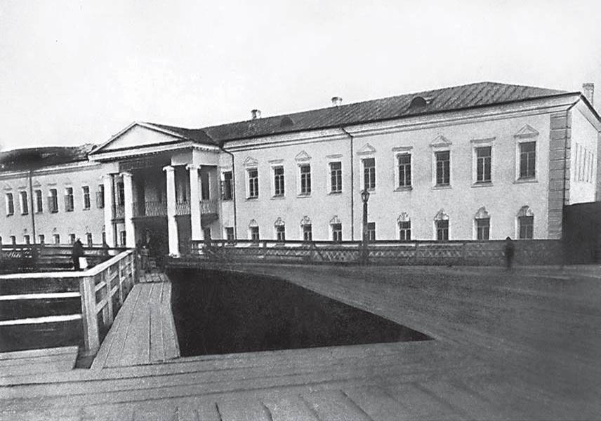 Здание Тобольской классической гимназии, в которой учился Д. И. Менделеев и преподавал П. П. Ершов